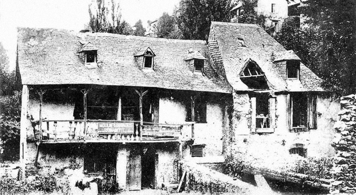 Moulin de Boly, Lourdes vers 1865-1870. Maison où est née Bernadette Soubirous en 1844. Carte Postale.